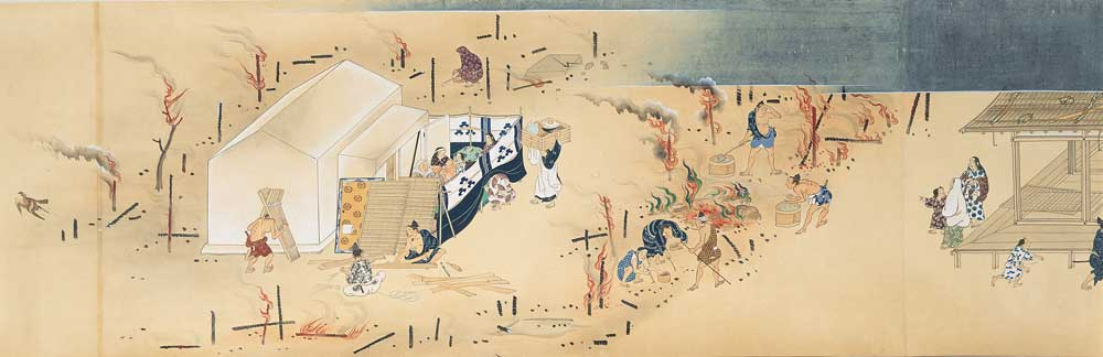 春日権現験記の中の土倉です。